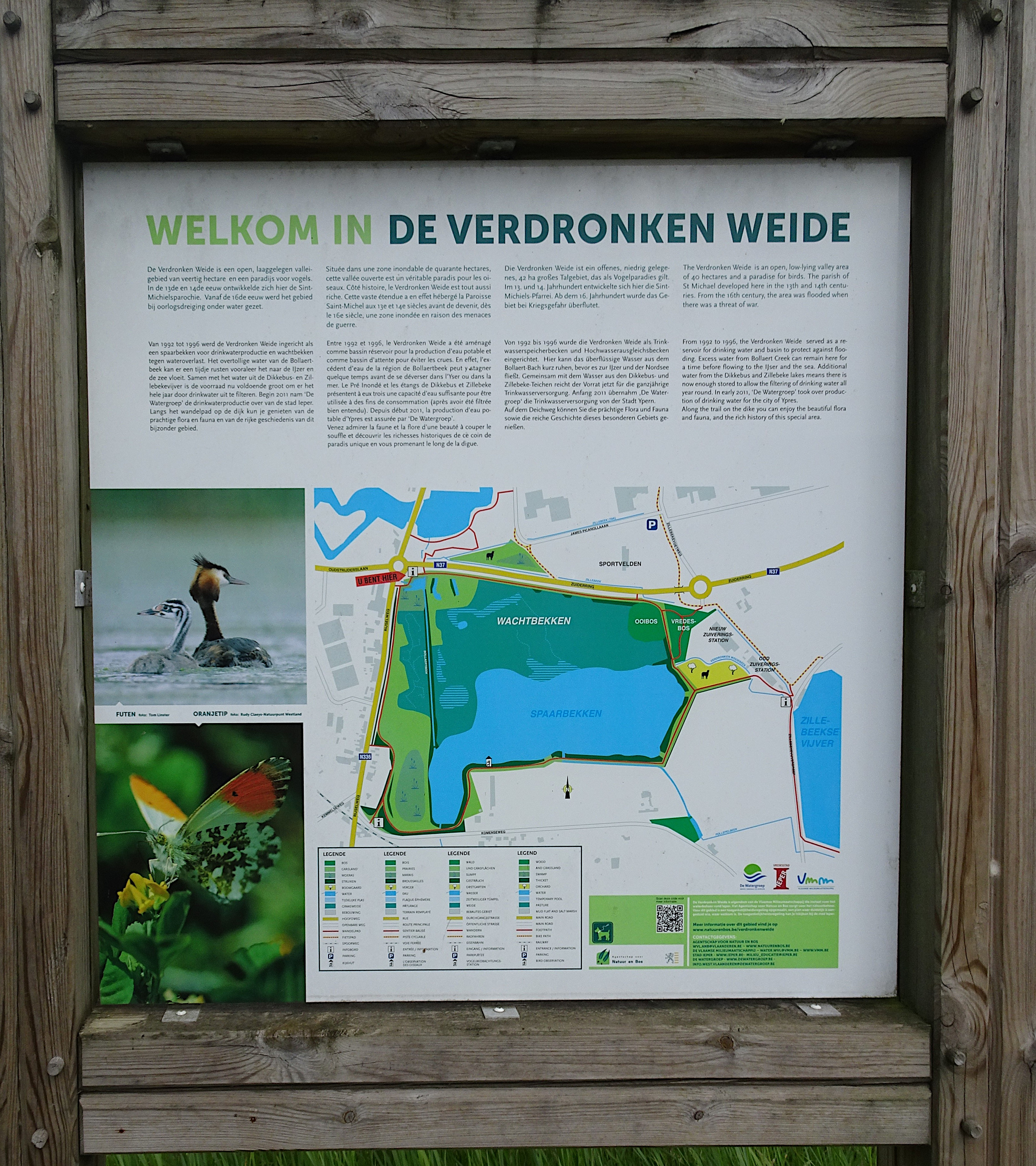 Autour de Zillebekevijver, Zillebeke Région_flamande